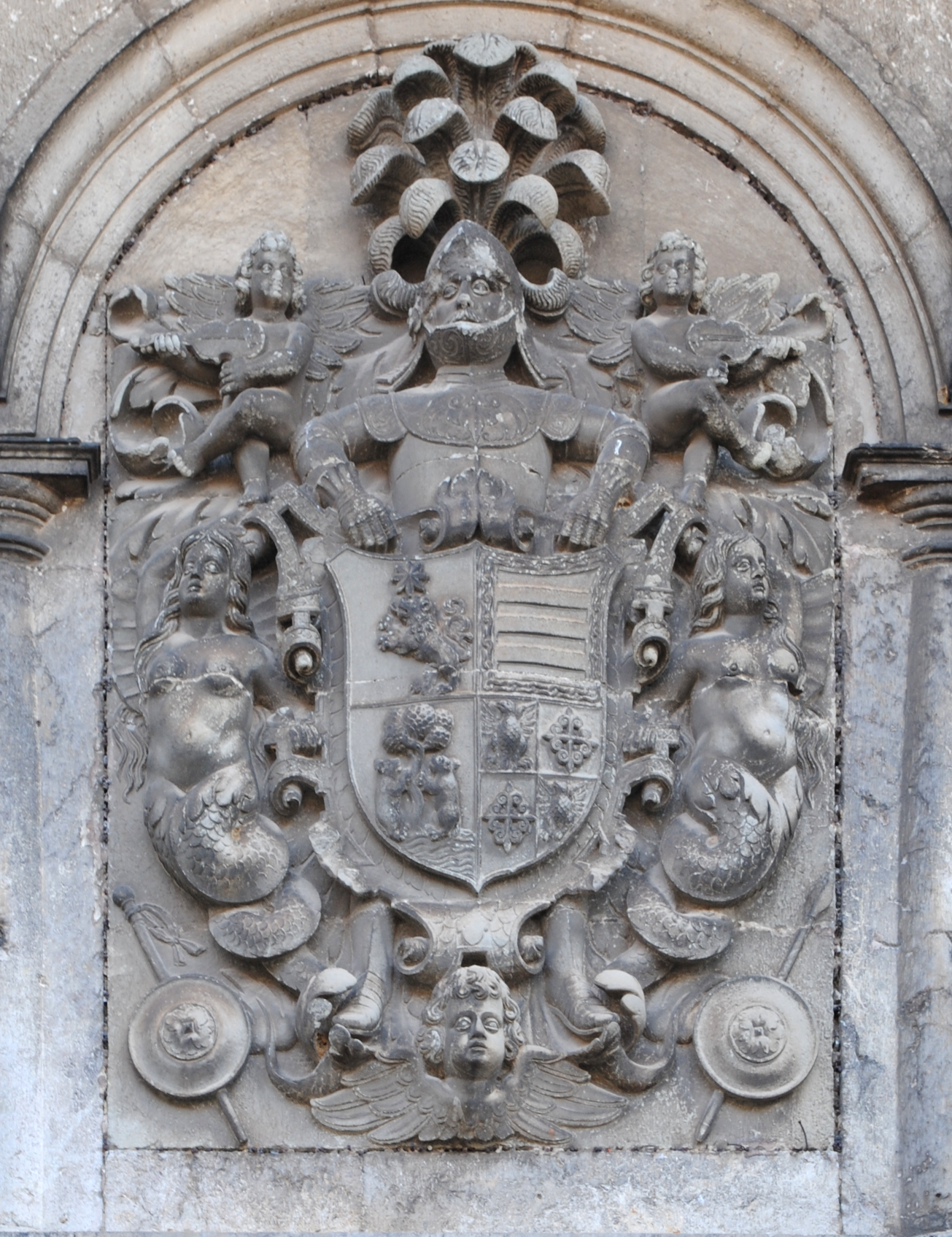 Lekeitioko Uriarte jauregiko armarria hurbiletik ikusia